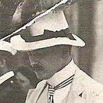 Alois Špalek, český architekt.